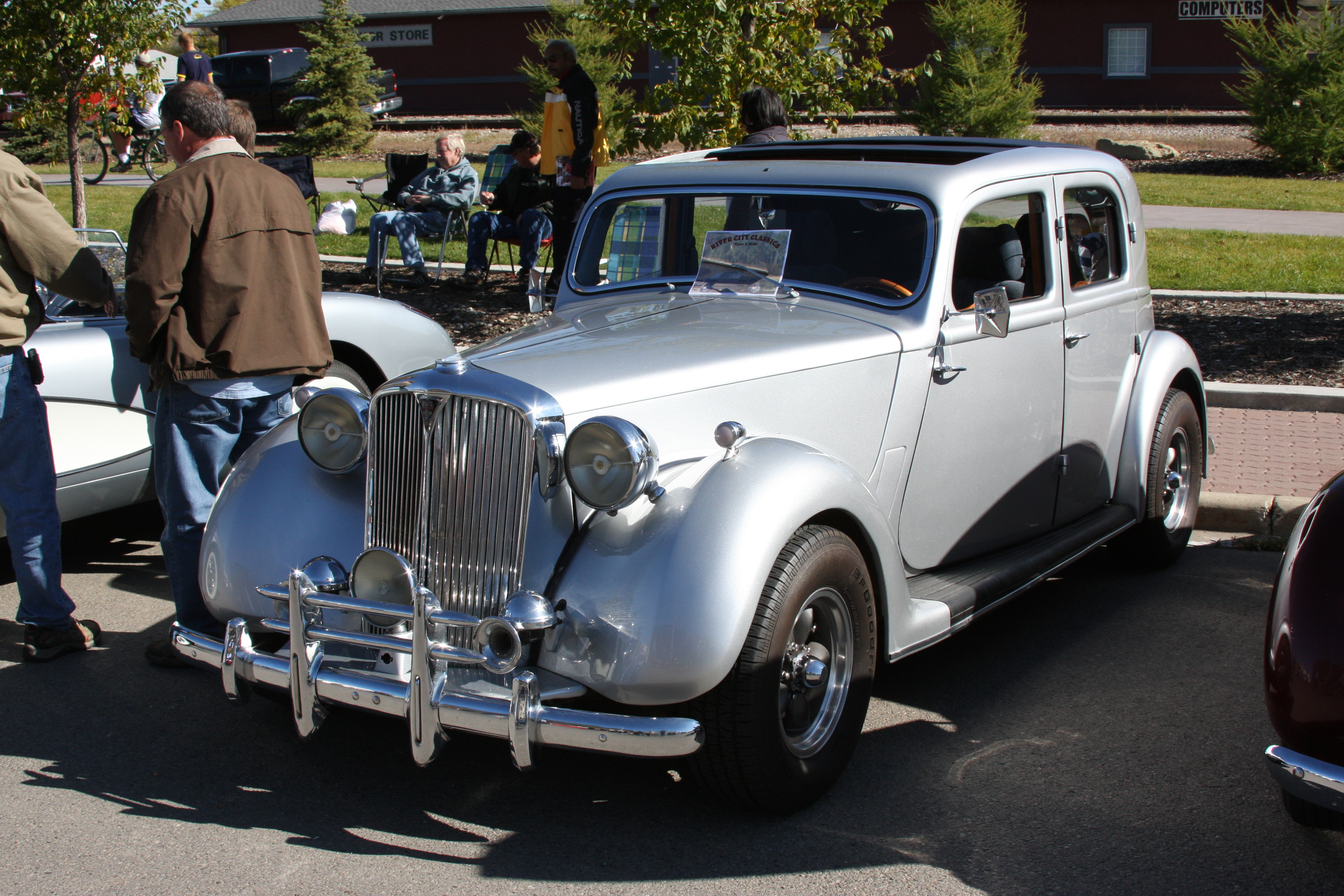 Rover Hot Rod - Chevrolet V8 powered